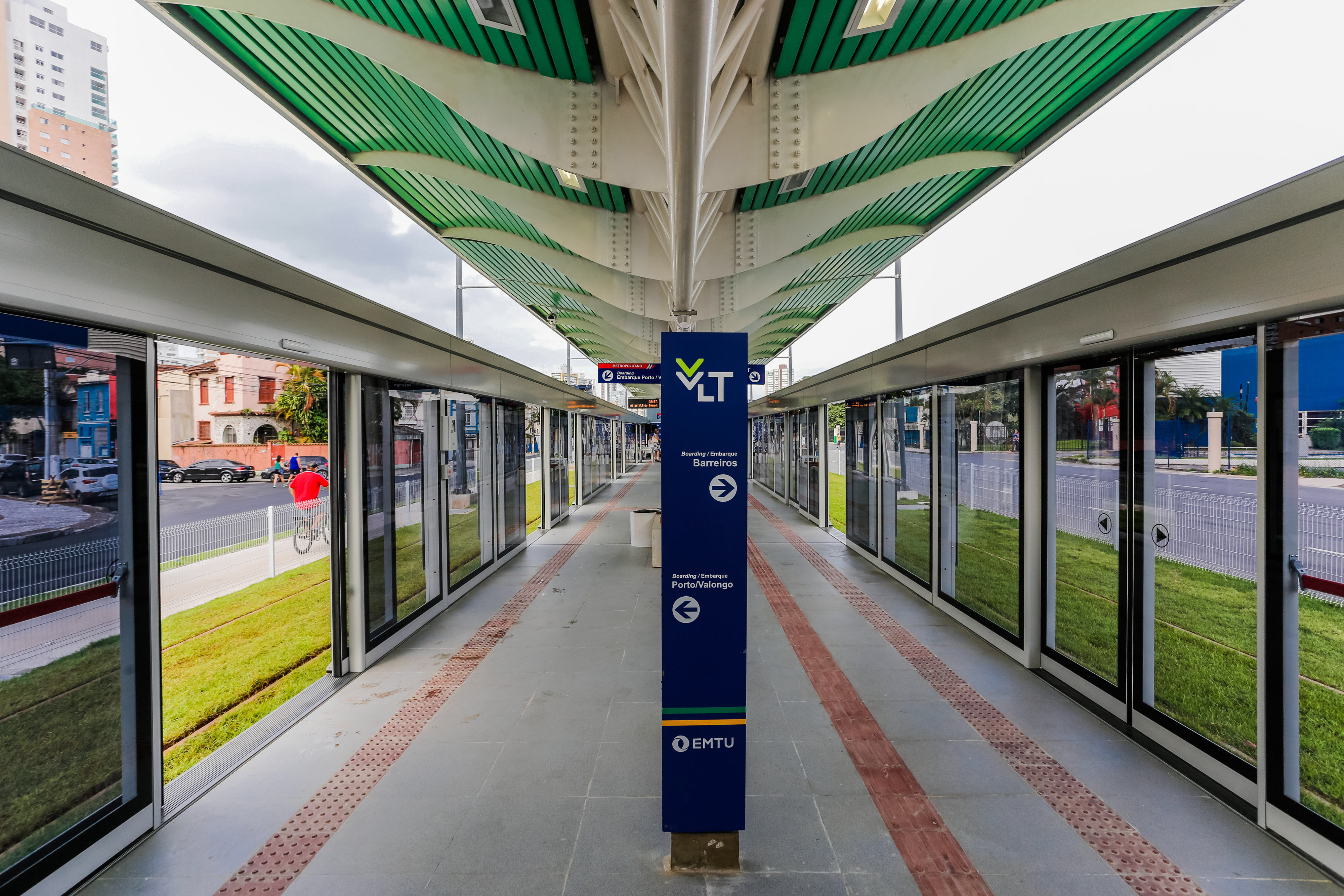 O Governador do Estado de São Paulo, Dr. Geraldo Alckmin, entregou as Estações Ana Costa, Washington Luís, Porto e Terminal Barreiros para operação e além de dois novos trens, do VLT, da EMTU/SP. Local: Santos/SP. Data: 31/01/2017. Foto: Alexandre Carvalho/A2img